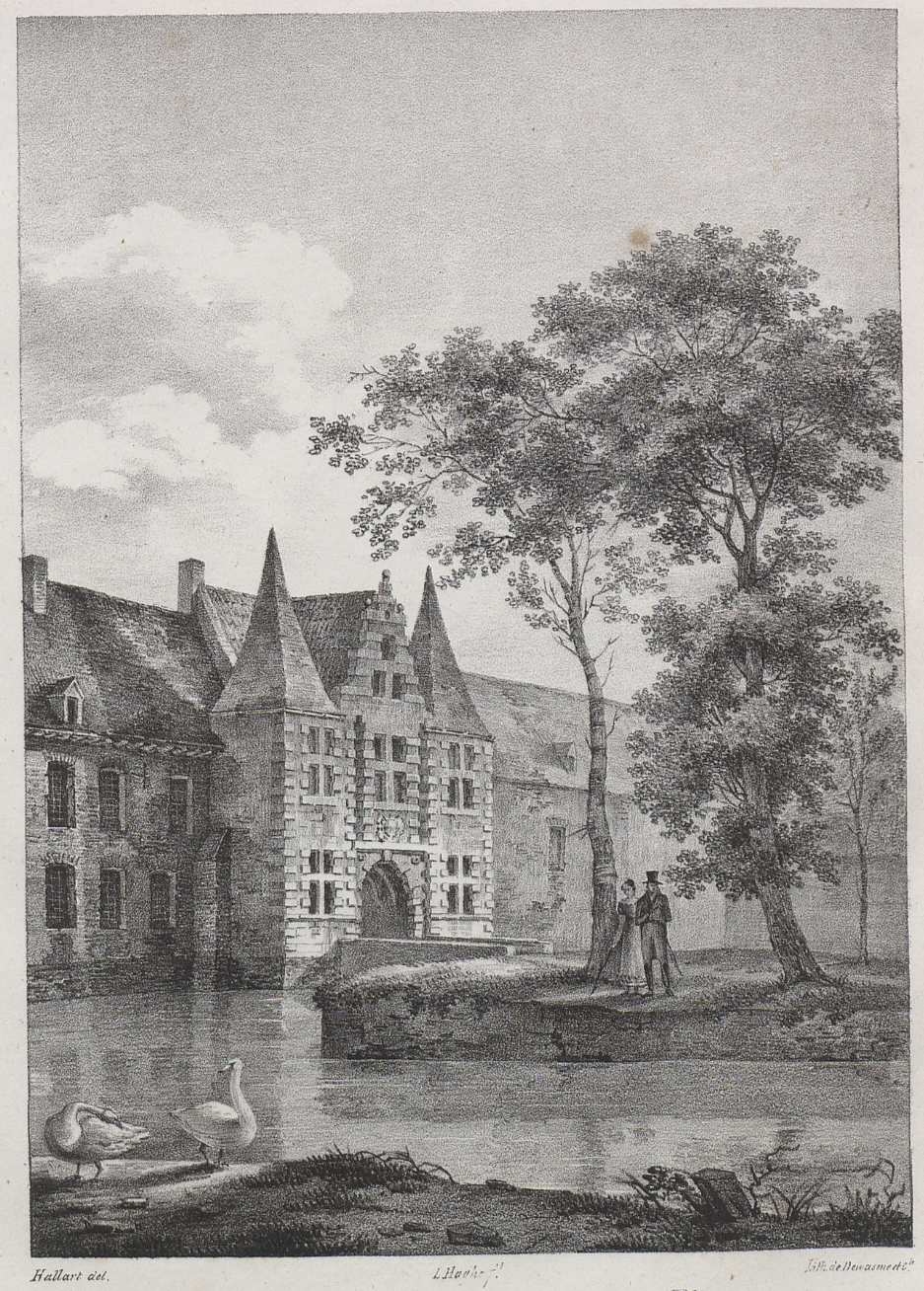 Kasteel van Biez, bij Péruwelz